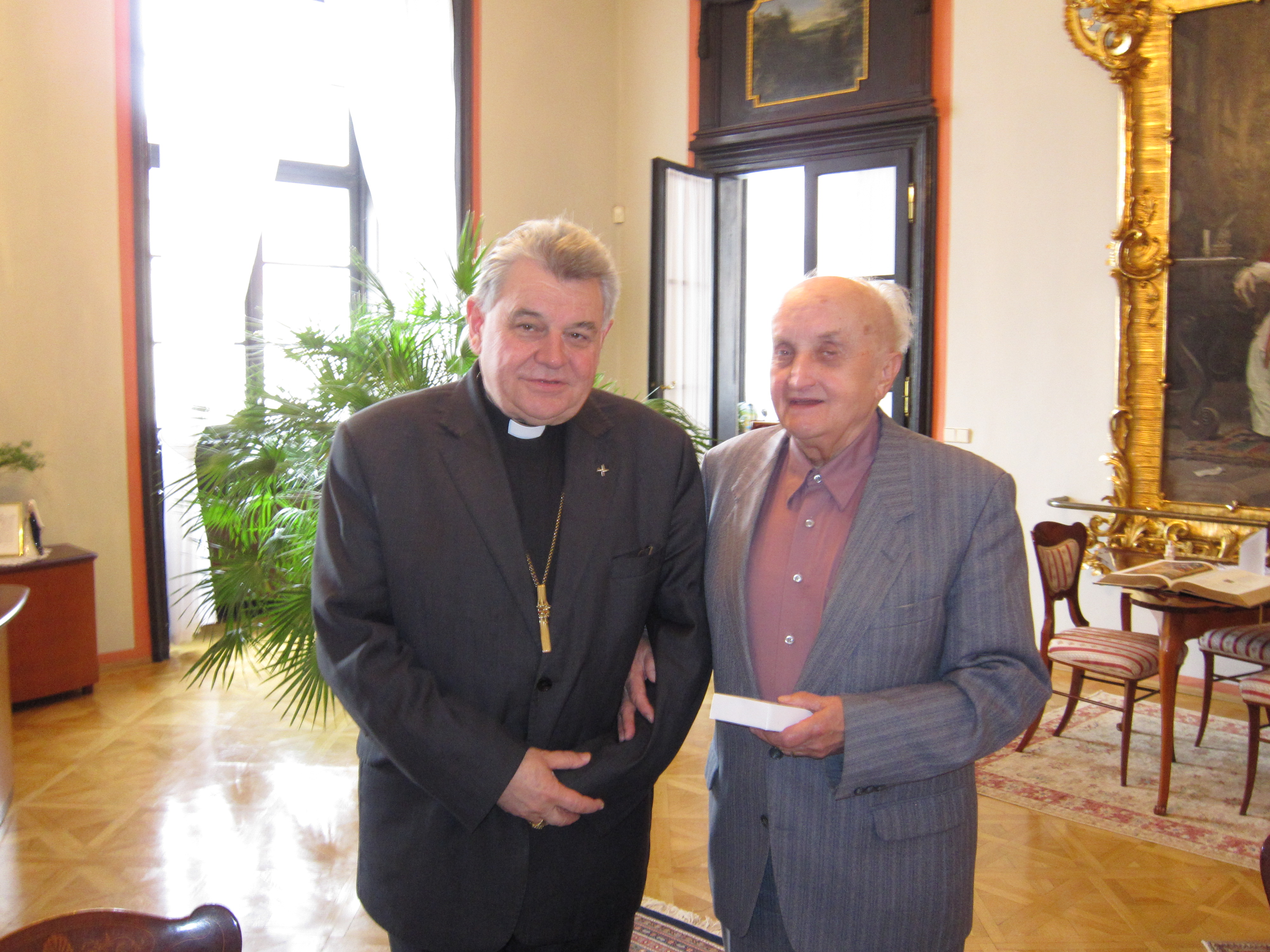 Dominik Kardinál Duka a Bohumil Svoboda při setkání v Arcibiskupském paláci v Praze.